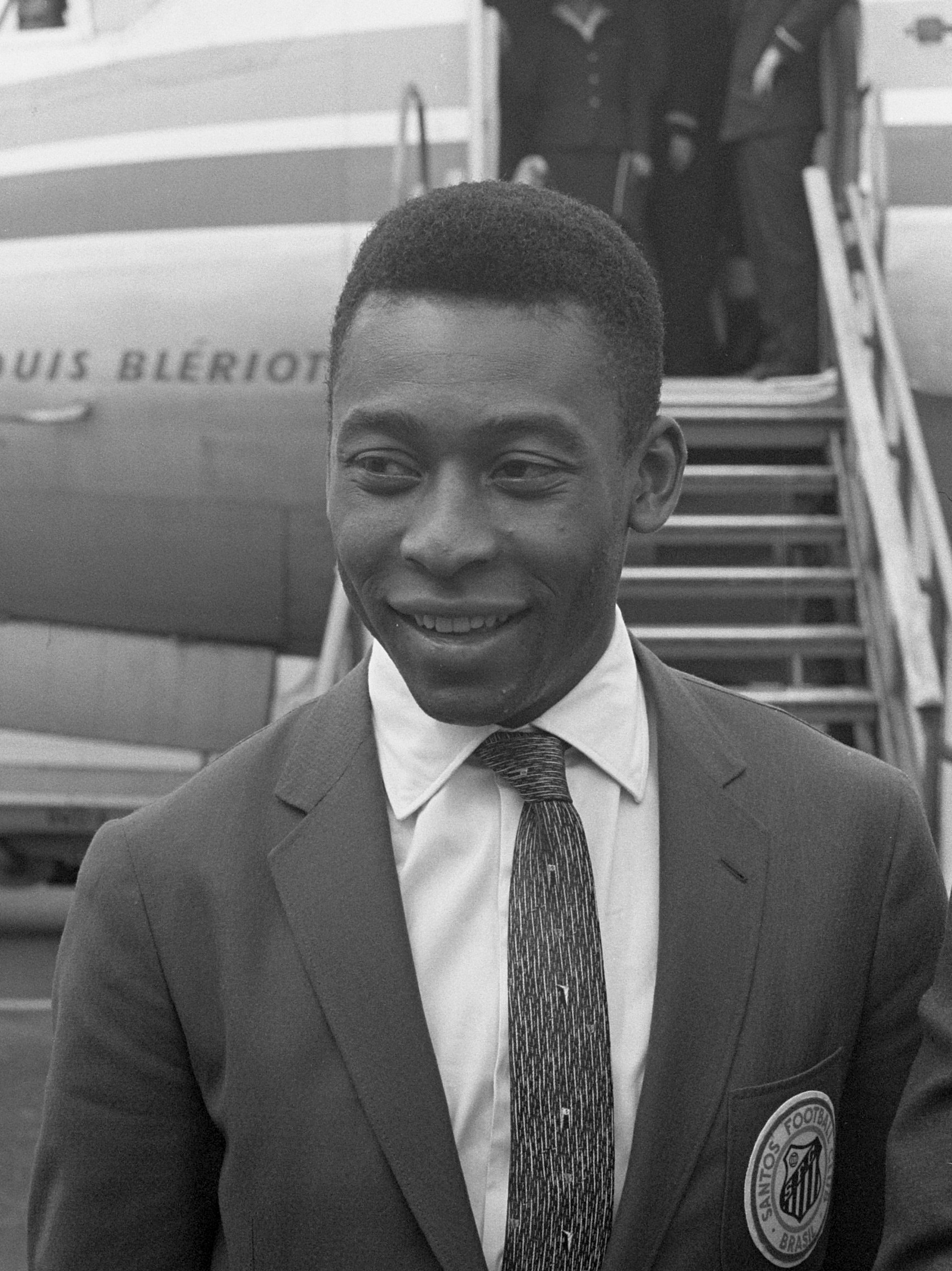 Pele, werelds duurste voetballer op Schiphol